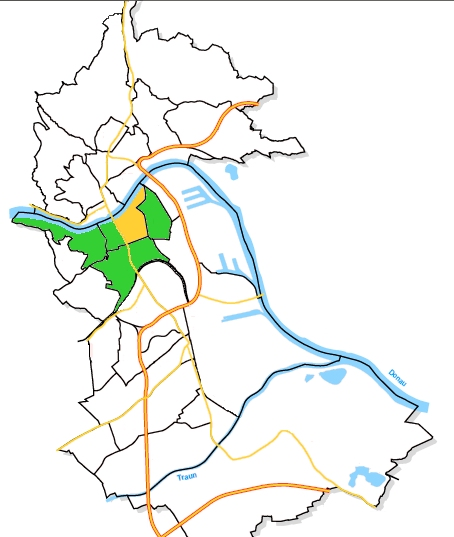 Städtische Bezirke Linz - Rathausviertel innerhalb Innenstadt hervorgehoben. Selbst gezeichnet auf Grundlage von: "Stadtforschung Linz: Linz 2000. Fakten, Bilder, Grafiken." (der greg:) 29.8.2006 - Lizenz: CC-BY-SA 2.0